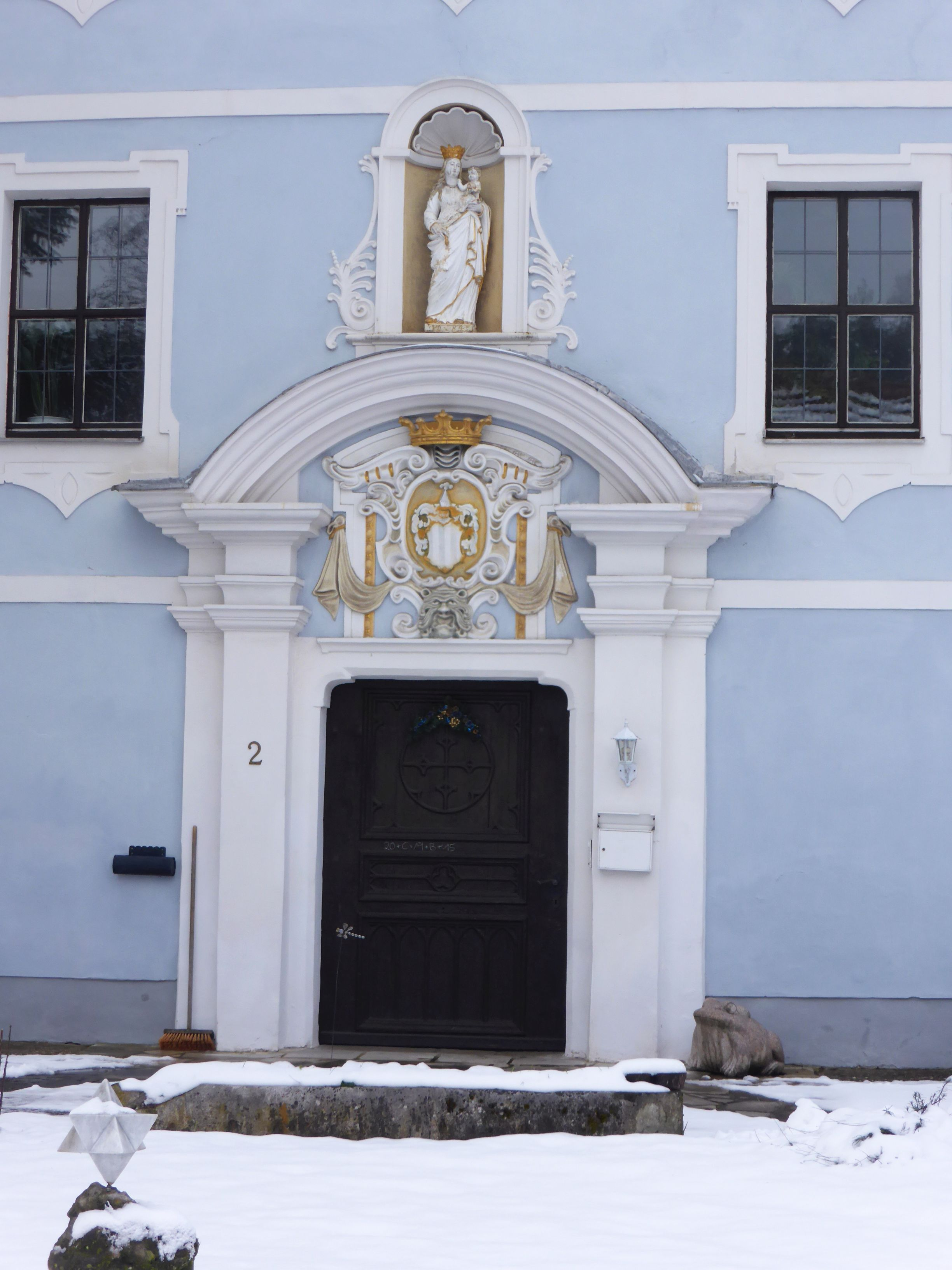 Traidendorf (Hammerschloss)